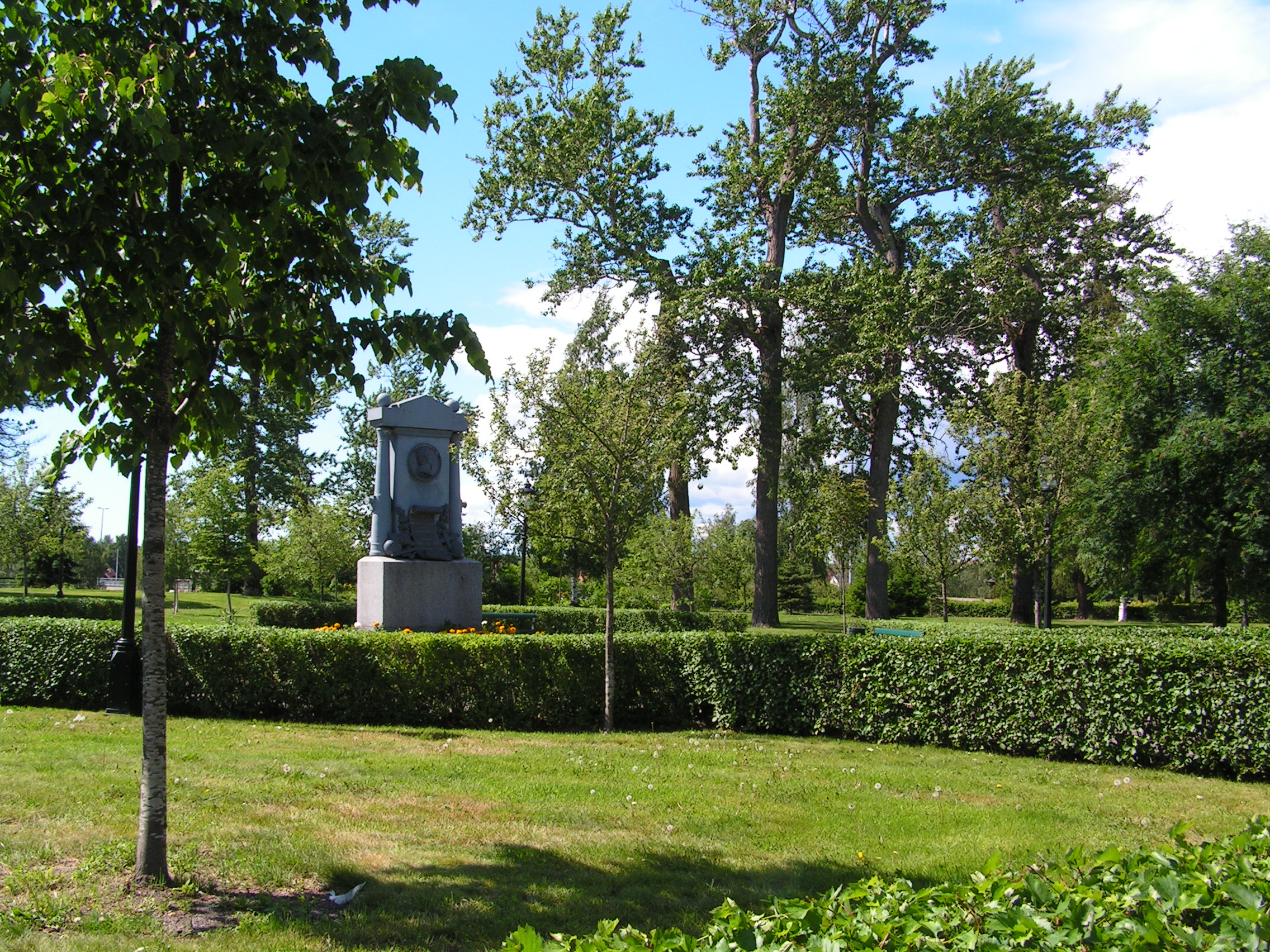 Döbelns park, Umeå, Sweden